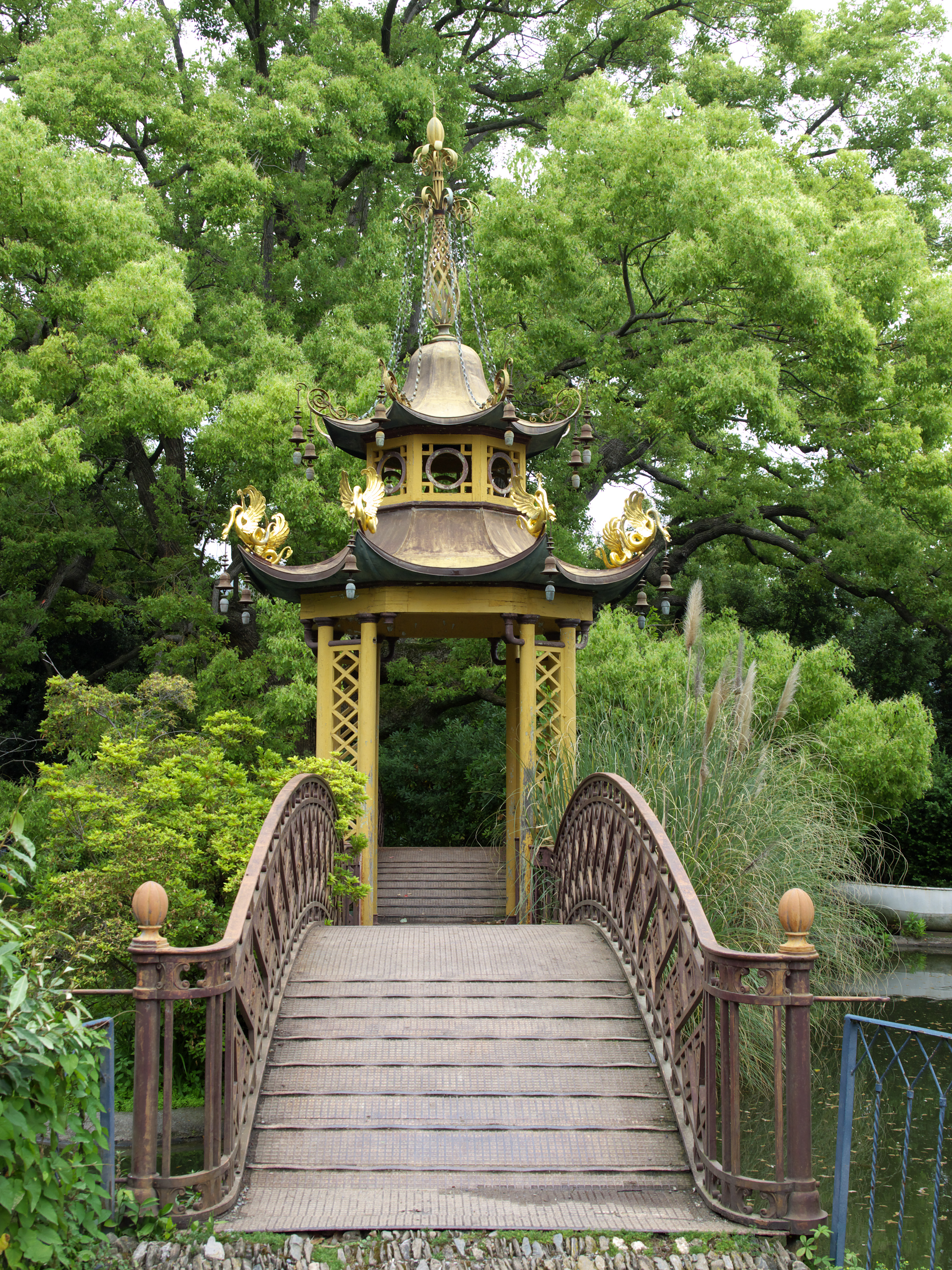 Parco e Villa Pallavicini This is a photo of a monument which is part of cultural heritage of Italy.